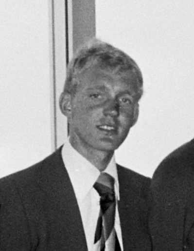 Olympische wielerploeg op weg van Schiphol naar Montreal; Fons van Katwijk